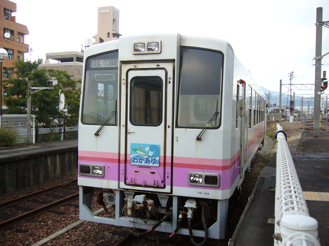 投稿者が延岡駅で2006年11月27日16時5分頃撮影。